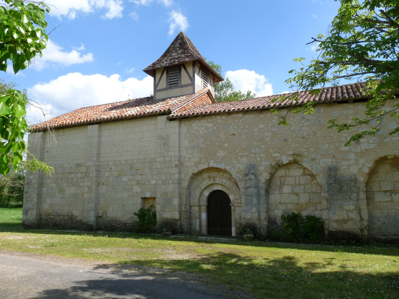 Eglise de Ponteyraud, Dordogne, France